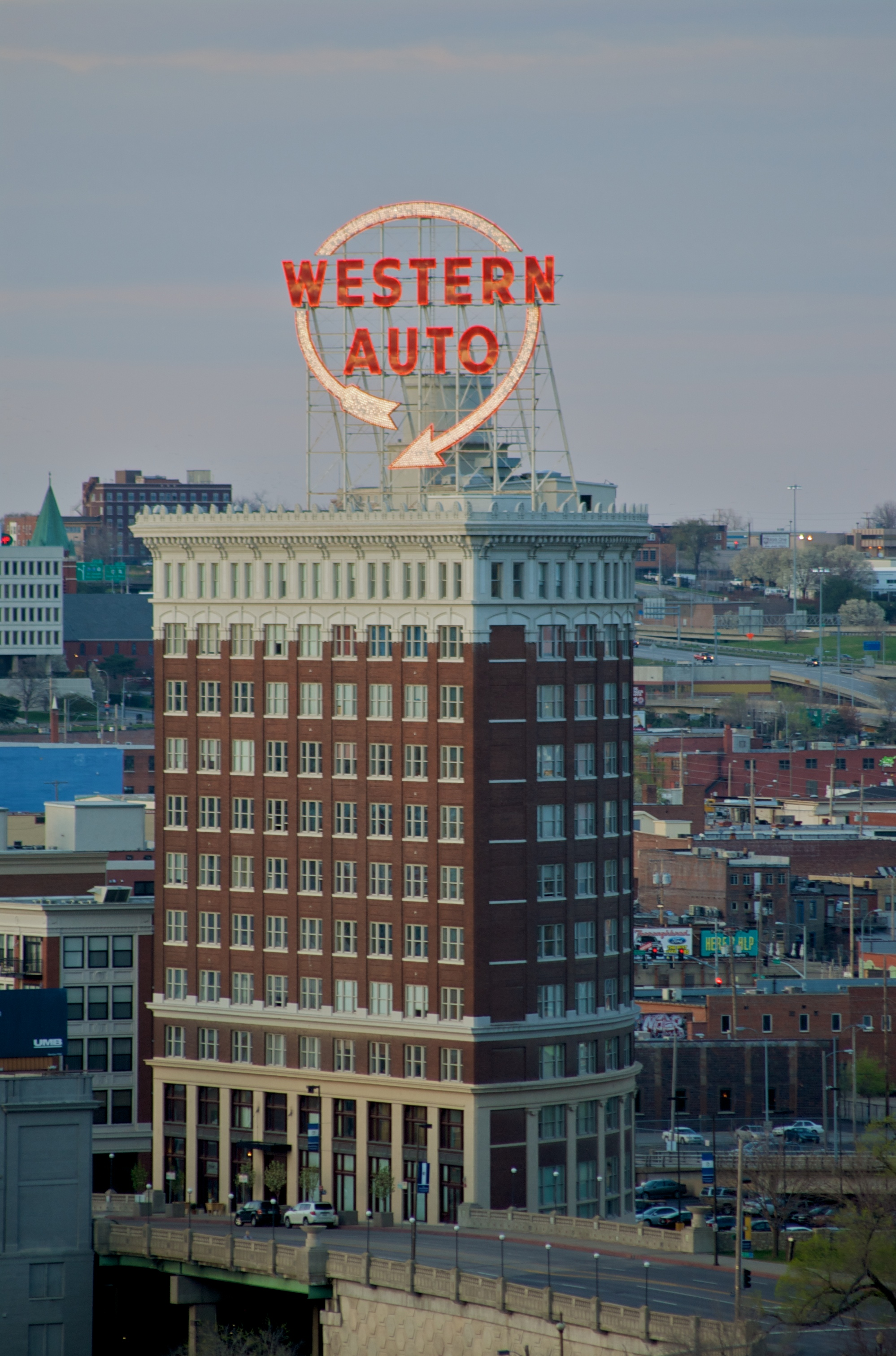 Western Auto